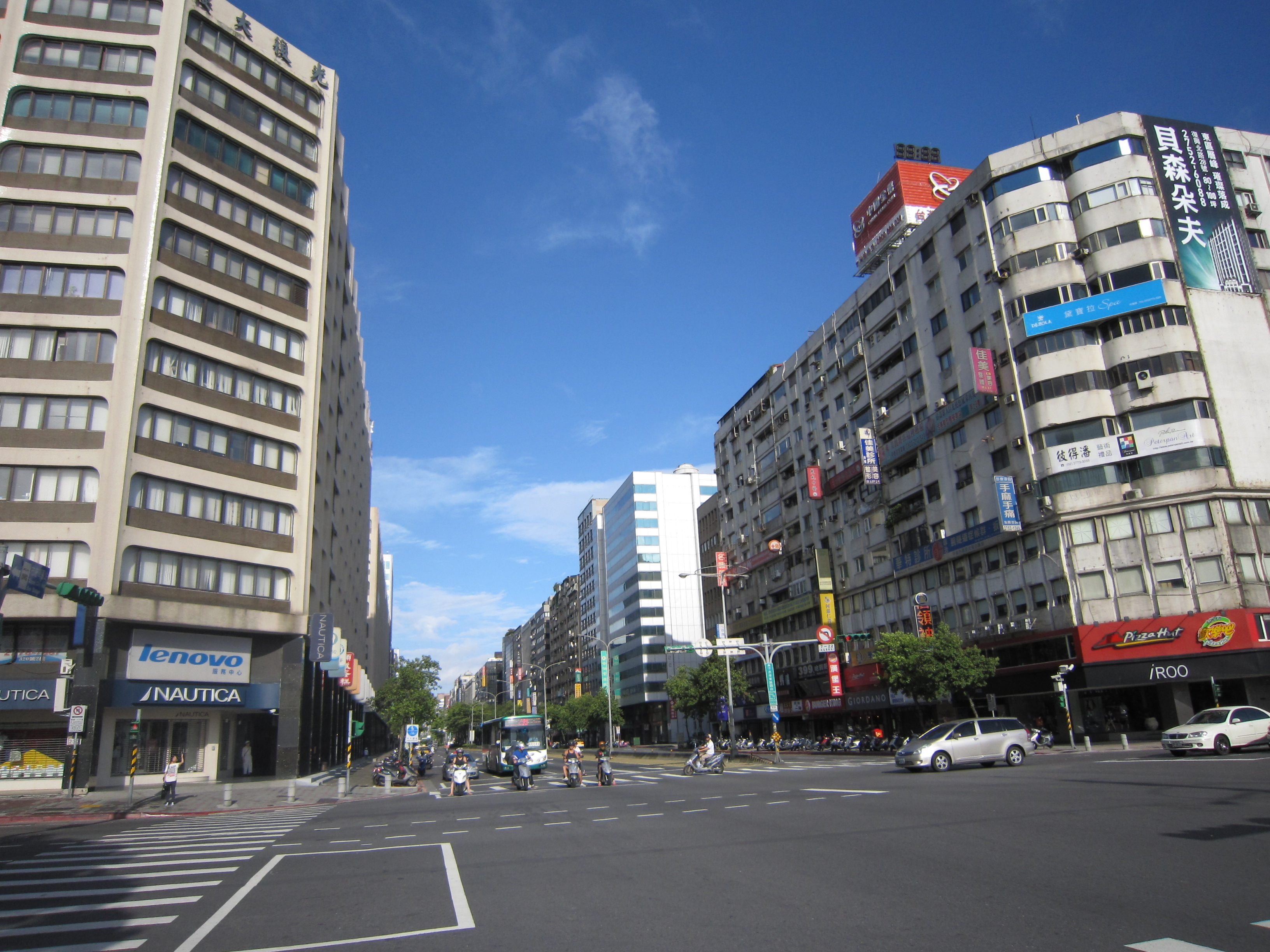 台北市建築攝影(光復南路與忠孝東路口)